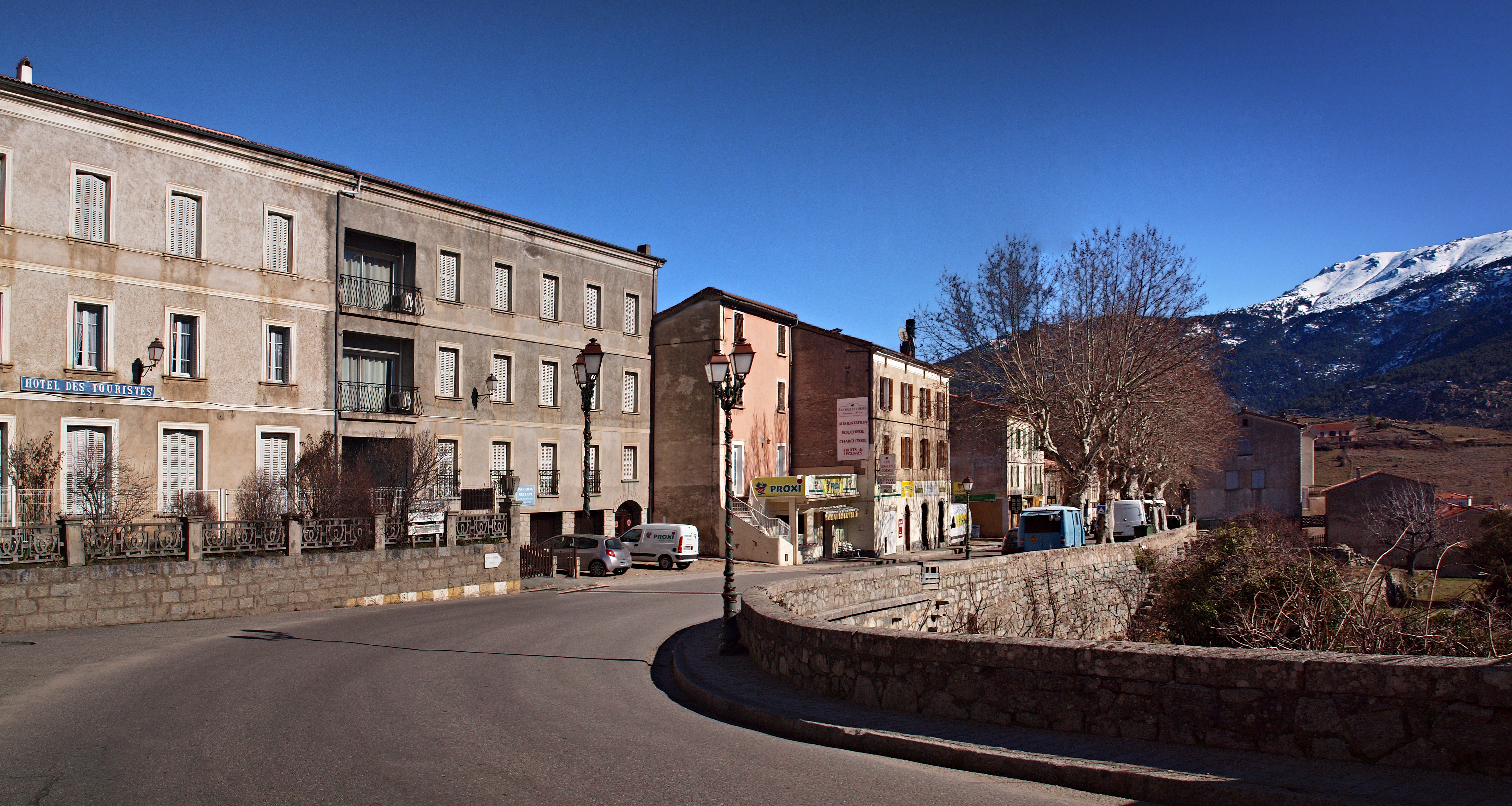 Calacuccia (Corse) - Avenue Valdoniello